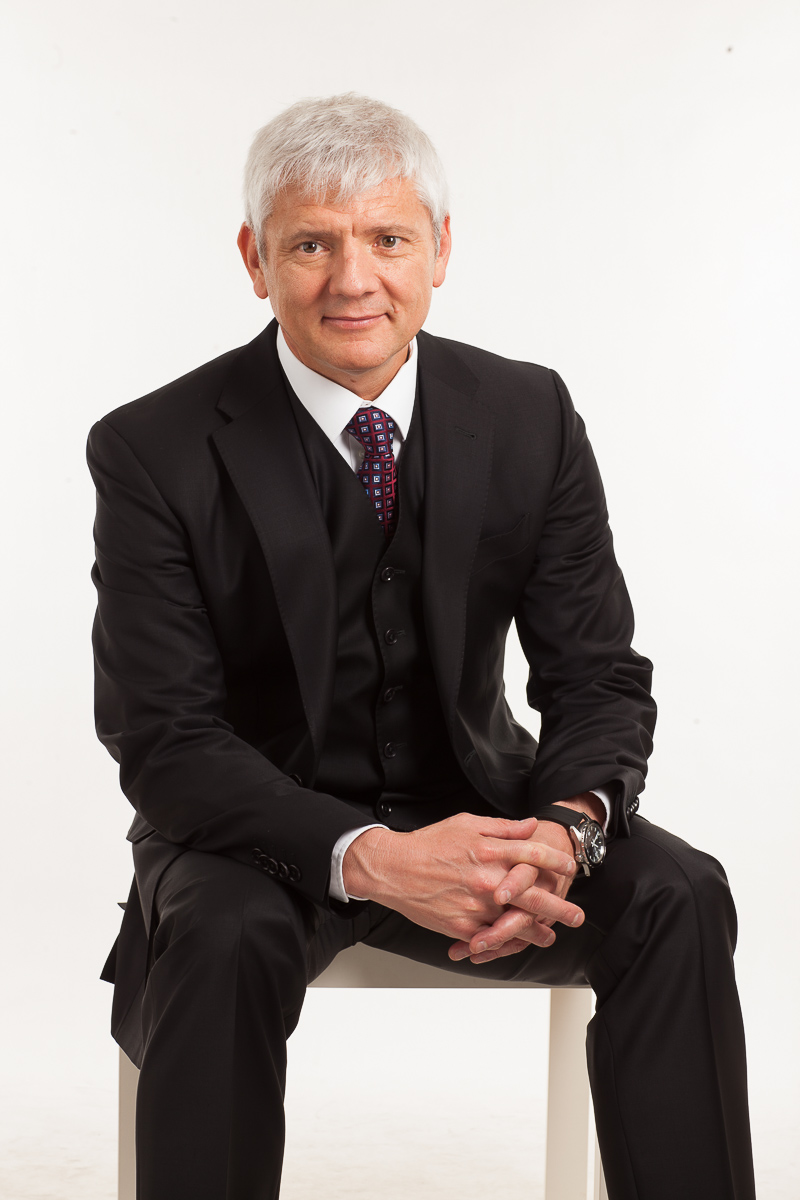 Petr Mihálik